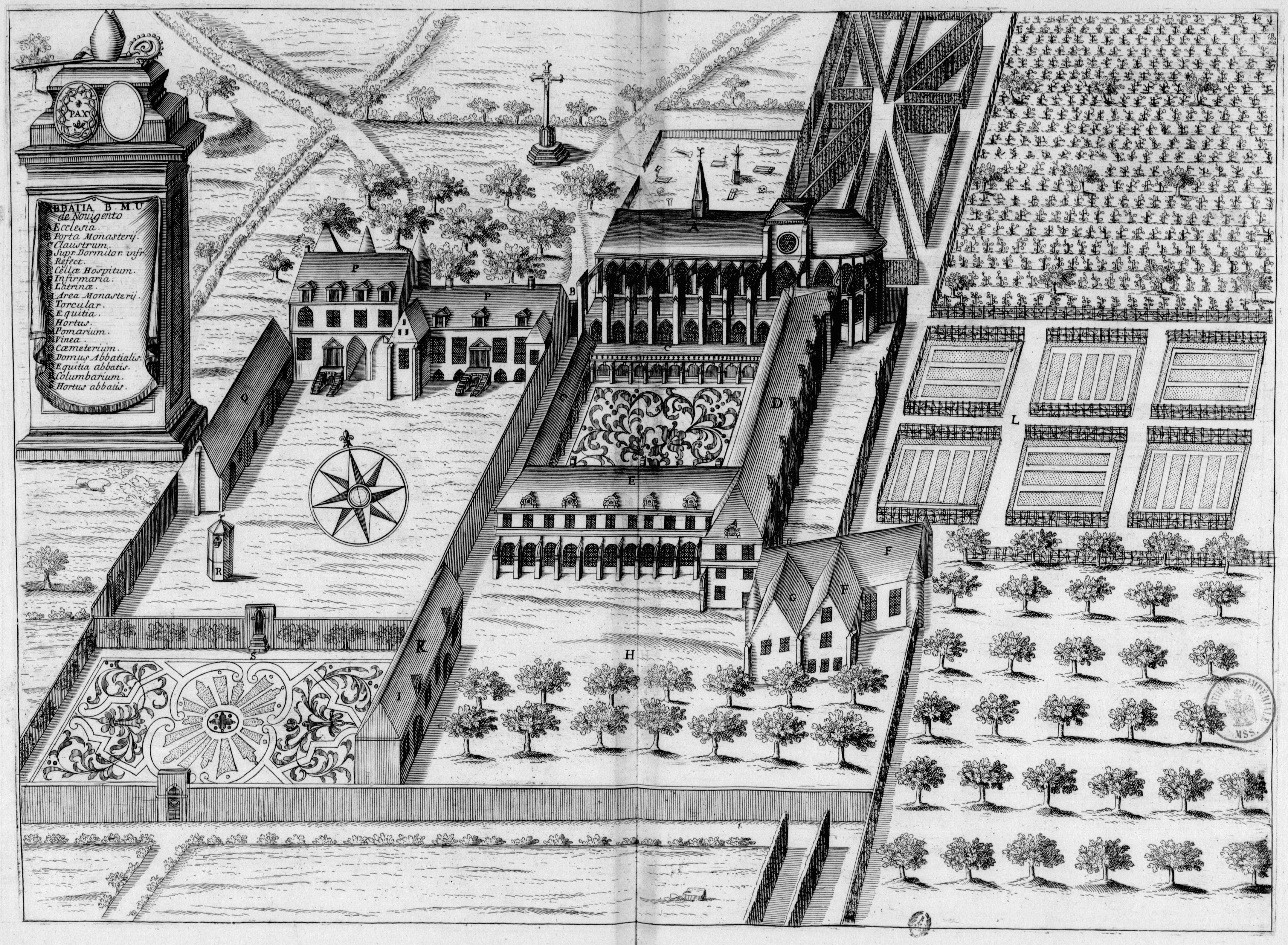 Planche gravée du 17ème siècle représentant l'abbaye Notre-Dame de Nogent-sous-Coucy, dans le livre Monasticon Gallicanum.